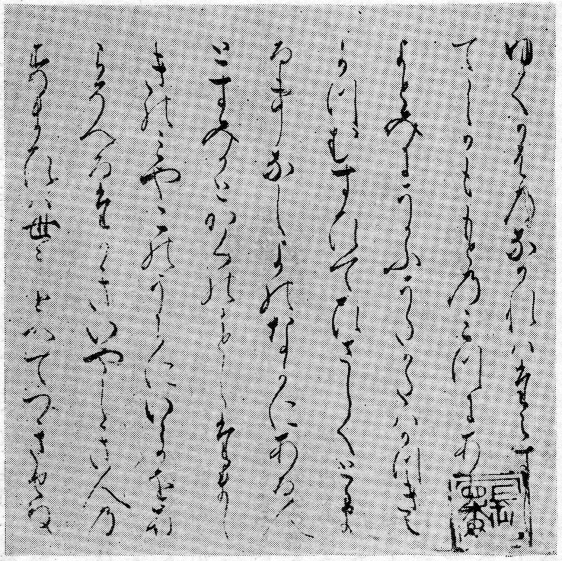 『方丈記』前田家本巻頭。